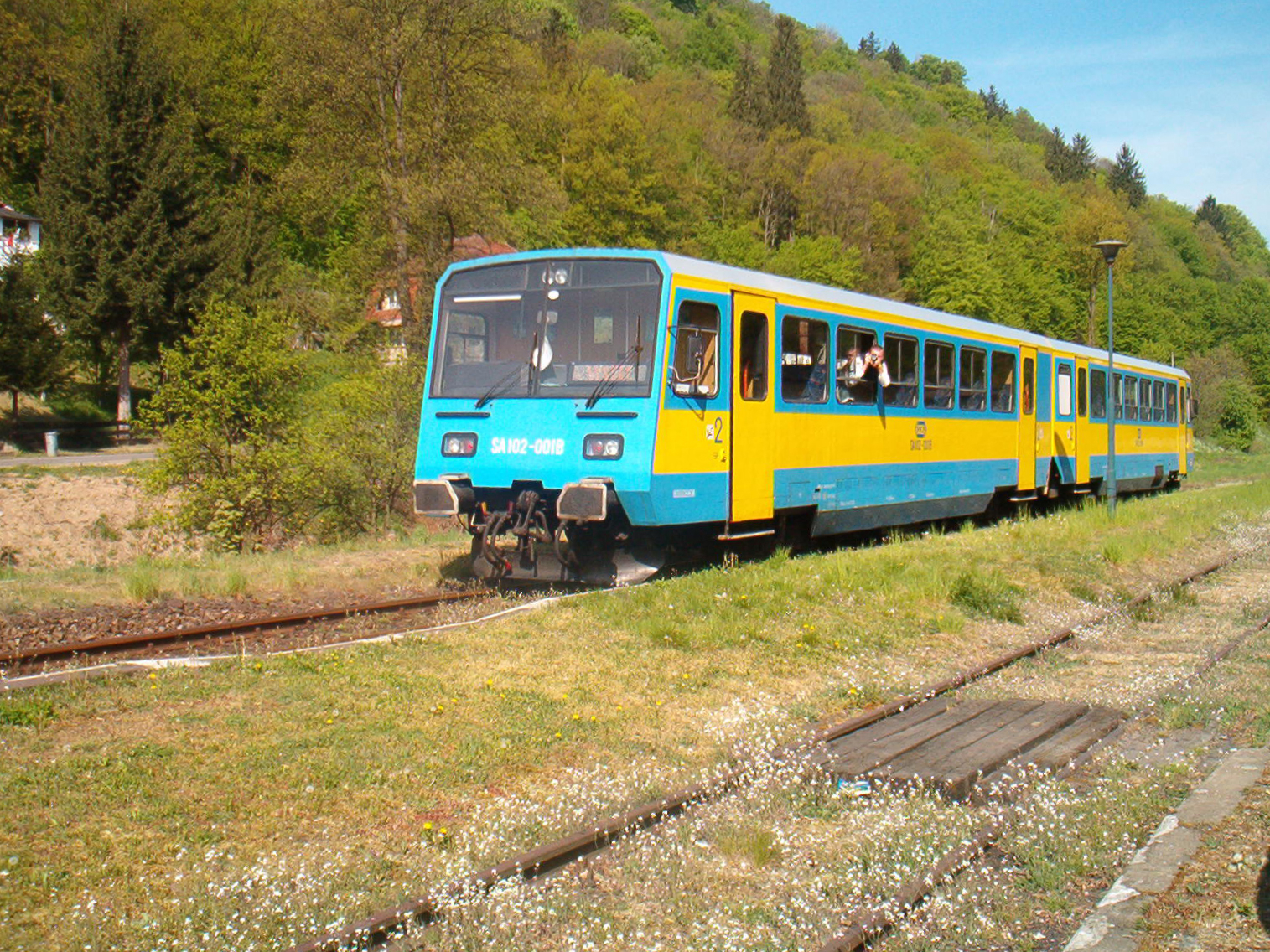 Szynobus SA102 stacjonujący w Jeleniej Górze odjeżdża ze stacji Wleń na linii Jelenie Góra-Lwówek Śl.